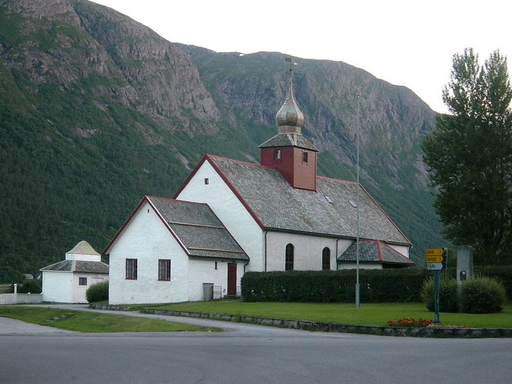 Hen church, Isfjorden, in Norway